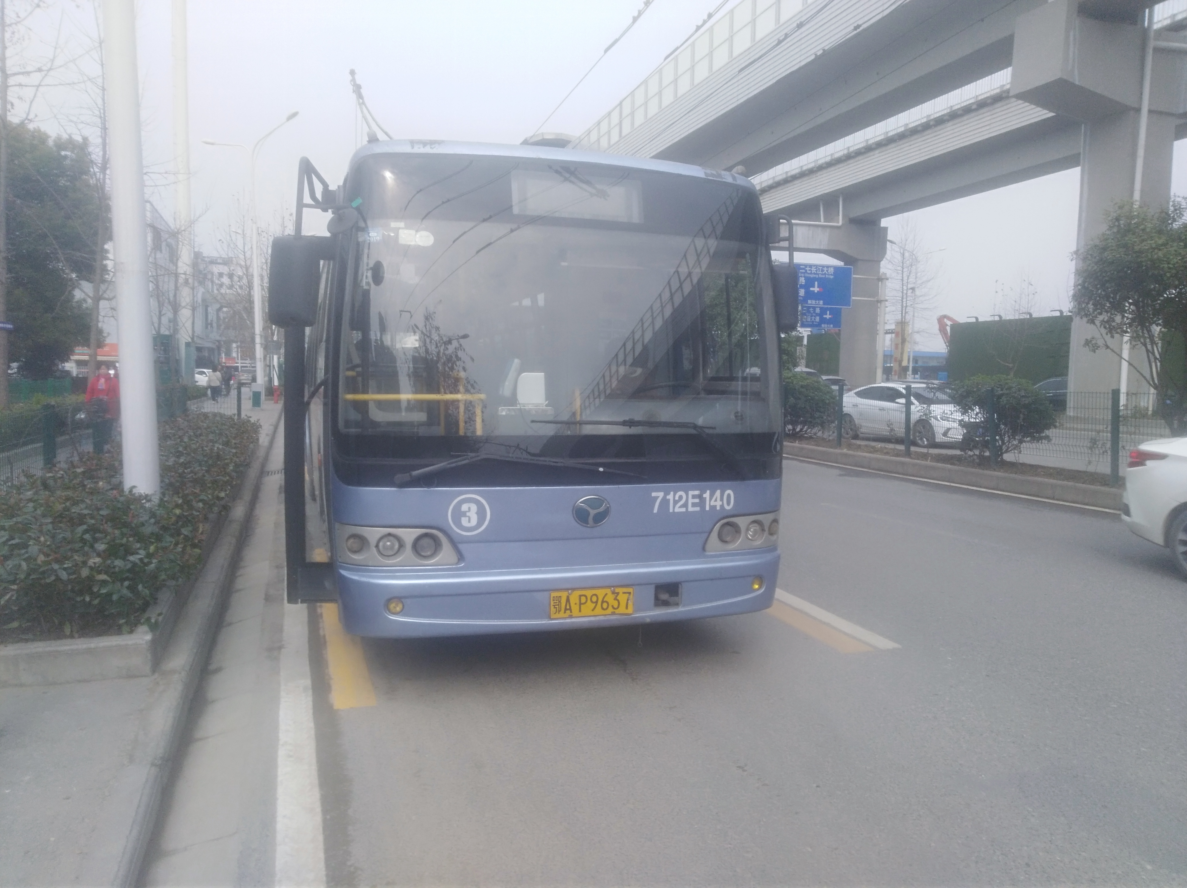 扬子江WGD61U公交车武汉有轨电车（非双源，非空调）